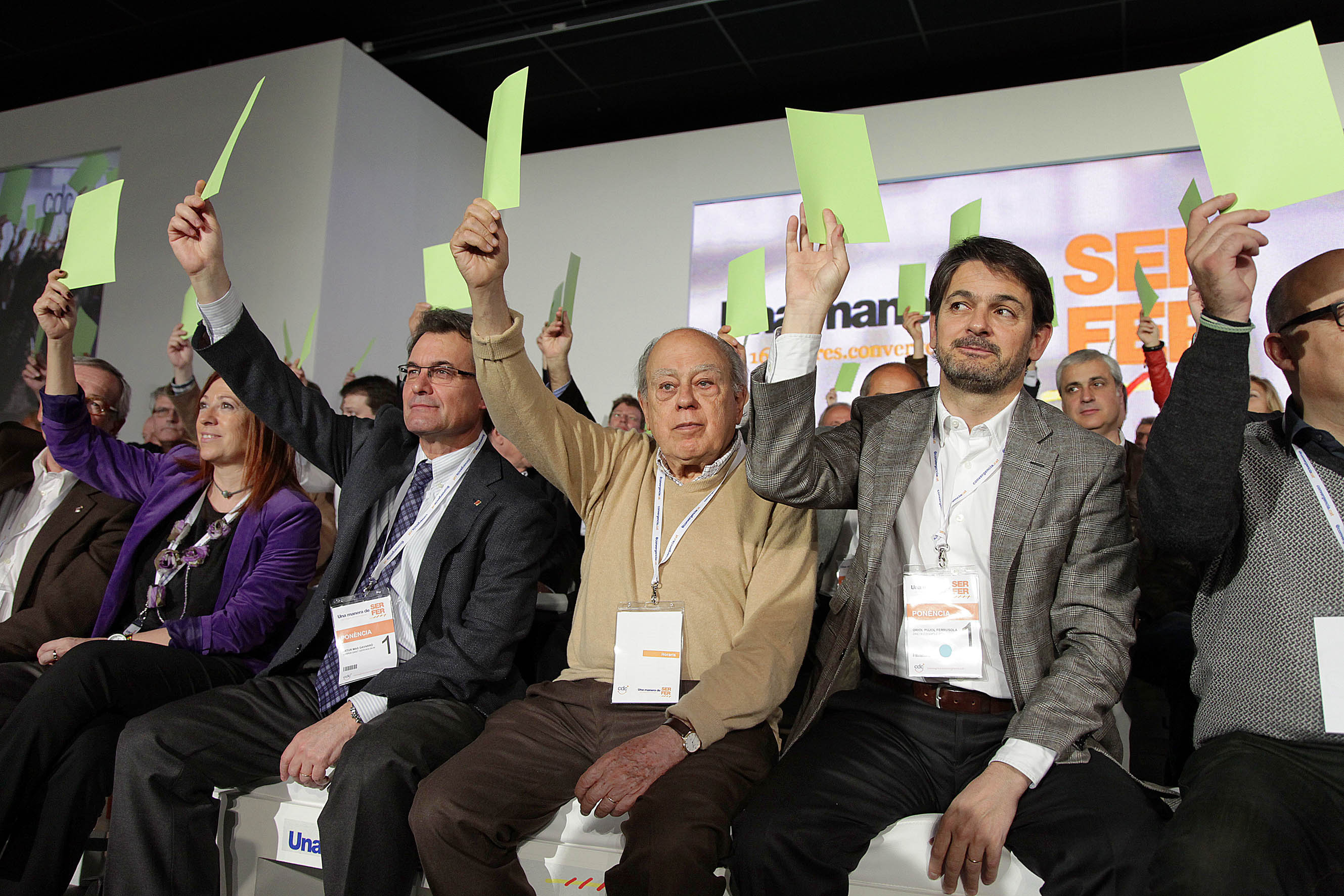 24.03.2012, Reus 16è Congrés de Convergència Democràtica de Catalunya a Reus. Informe de Gestió de la Direcció Nacional. foto: CDC / Jordi Play